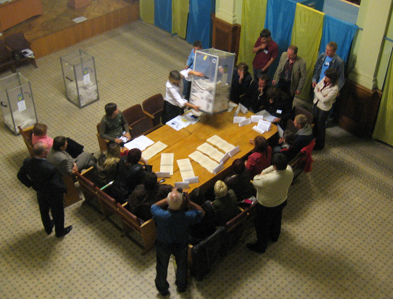 Підрахунок голосів на позачергових виборах до ВР України 2007